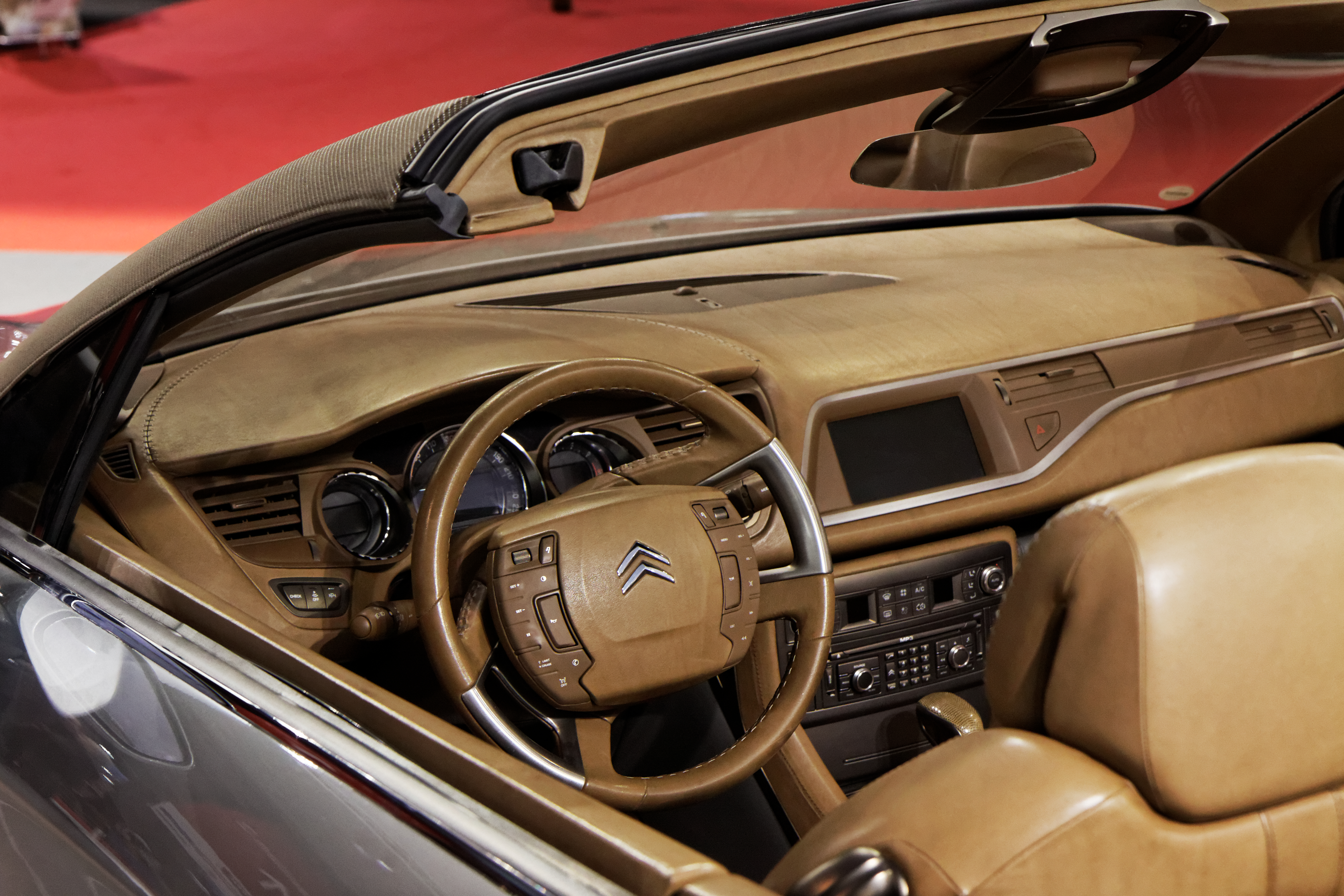 Une Citroën C5 Airscape présentée lors du salon Retromobile 2013.